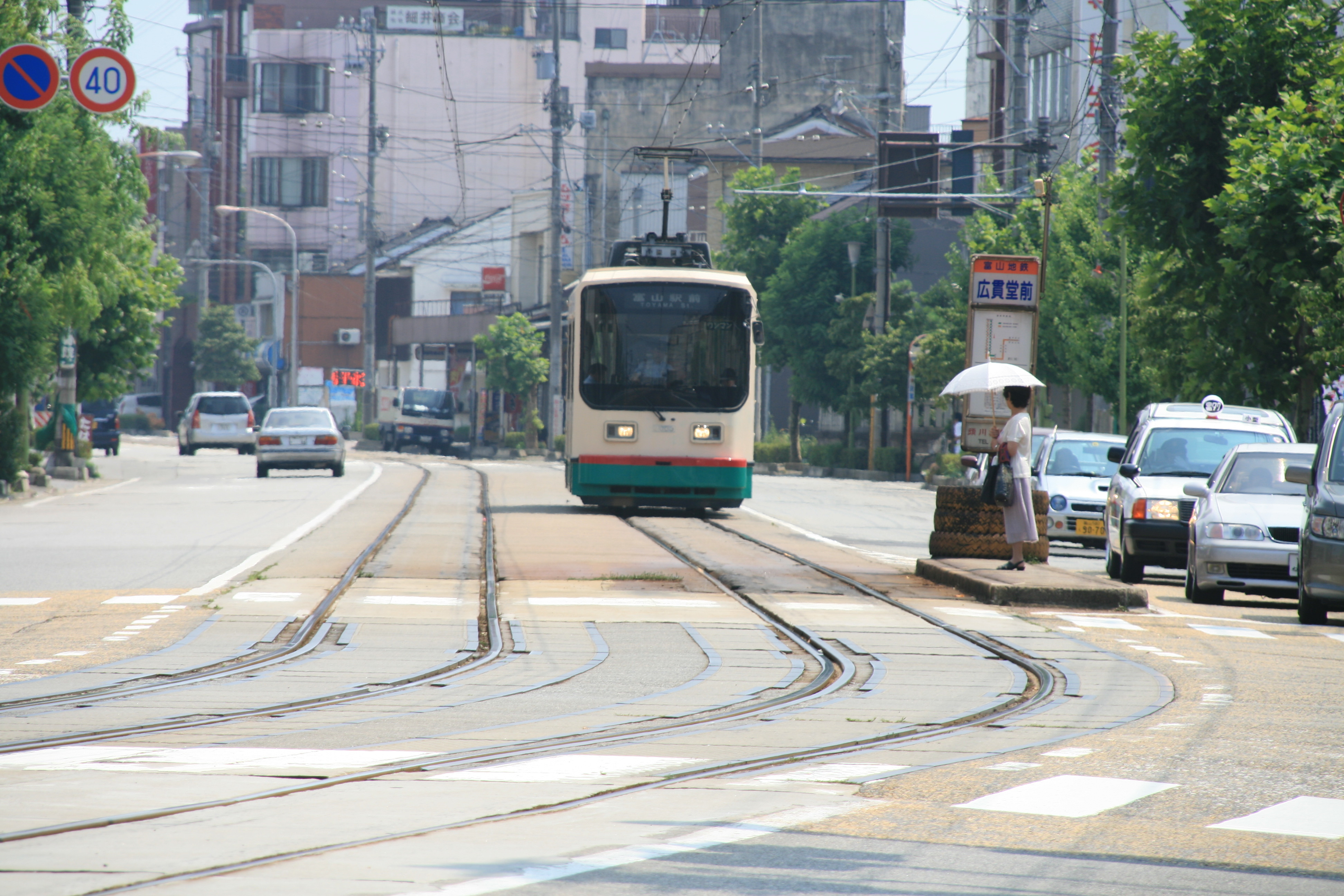 広貫堂前停留場, Nakanoshinmachi, Toyama, Toyama Prefecture 939-8085, Japan